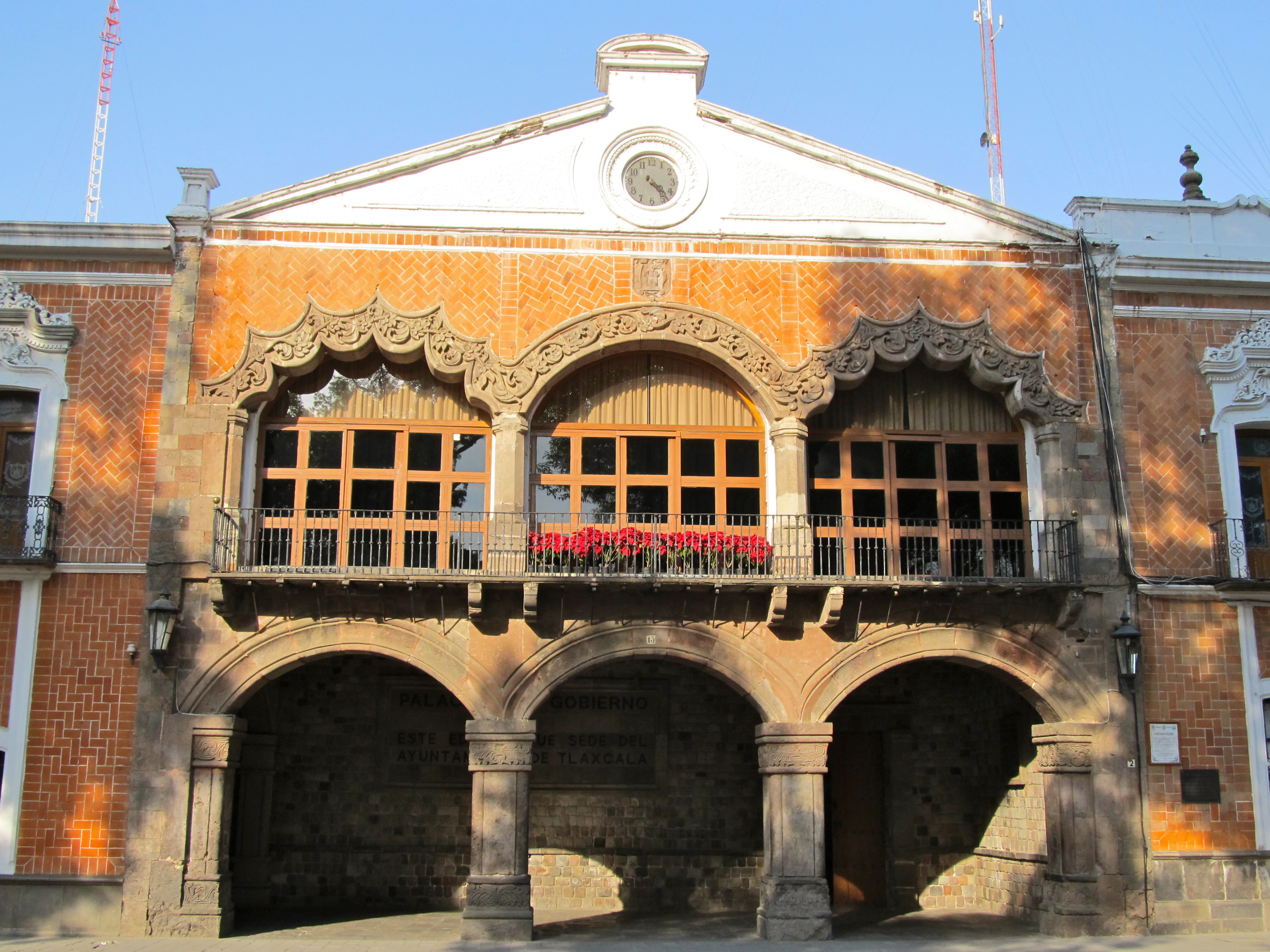 Ayuntamiento de Tlaxcala